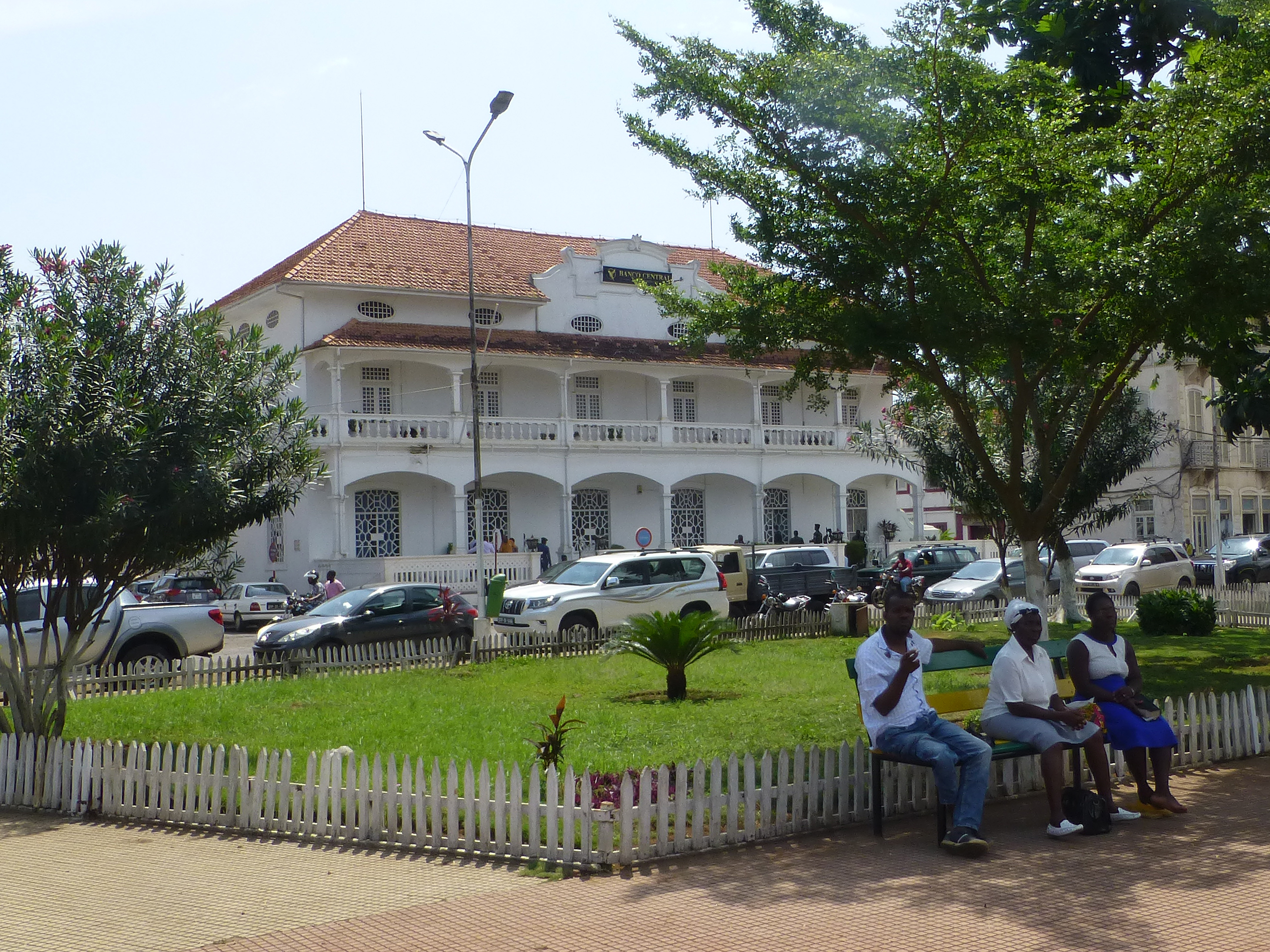 Banco Central de São Tomé.